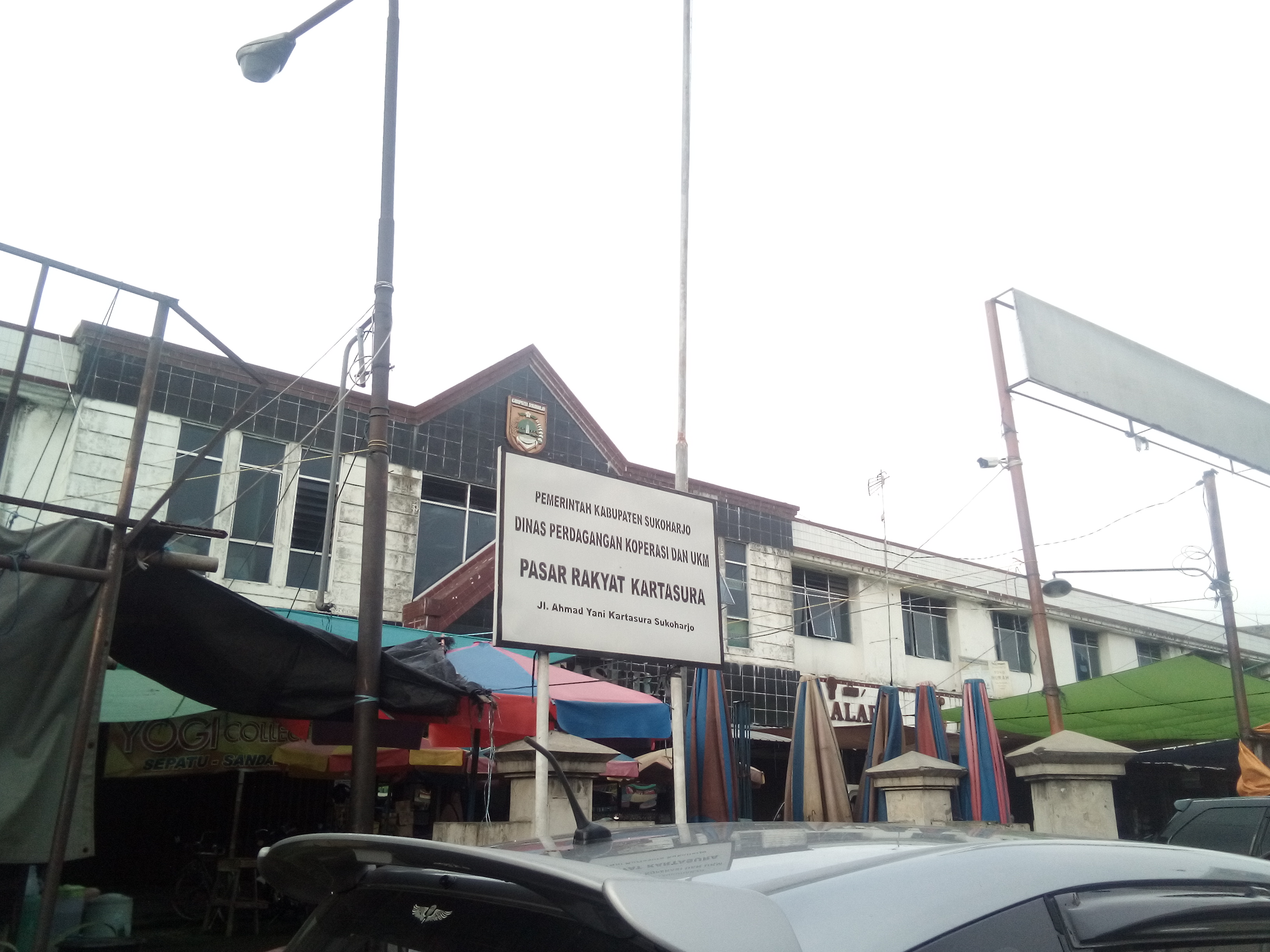 Jawa: Pasar Kartasura minangka pasar sing ana ing Kecamtan Kartasura, Kabupatèn Sukoharjo. Ing pasar iki ana manèka werna bakul woh-wohan, janganan lan panganan.